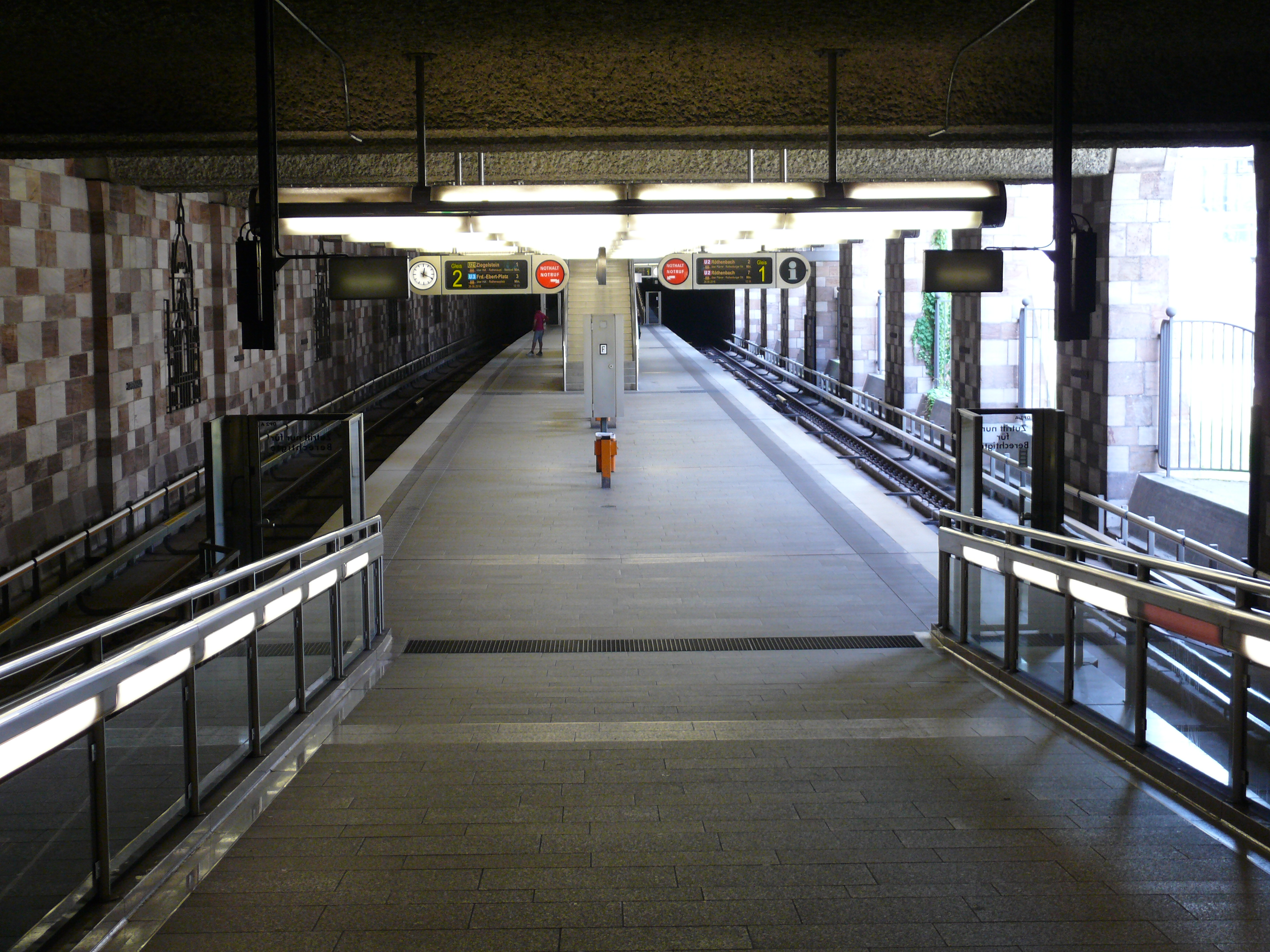 Blick auf die Bahnsteigebene am U-Bahnhof Opernhaus in Nürnberg.